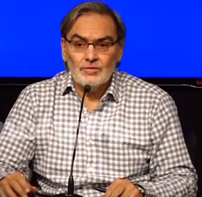 El ministro de energía explicando sobre lo que pudo causar el apagón.